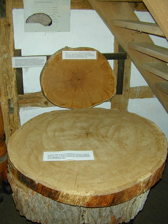 Quercus petraea, Forstmuseum Usedom